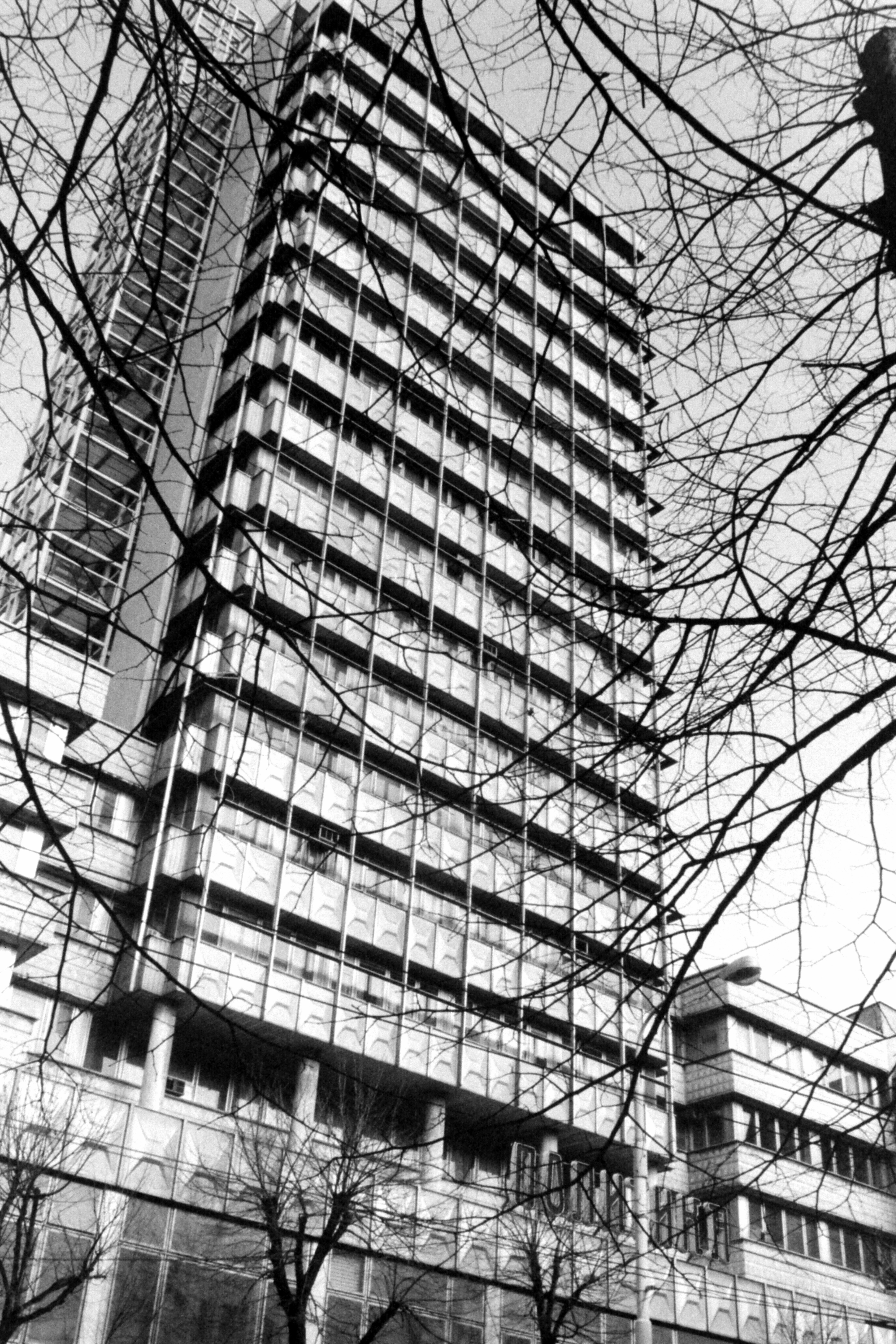 Palata Politika u Beogradu.